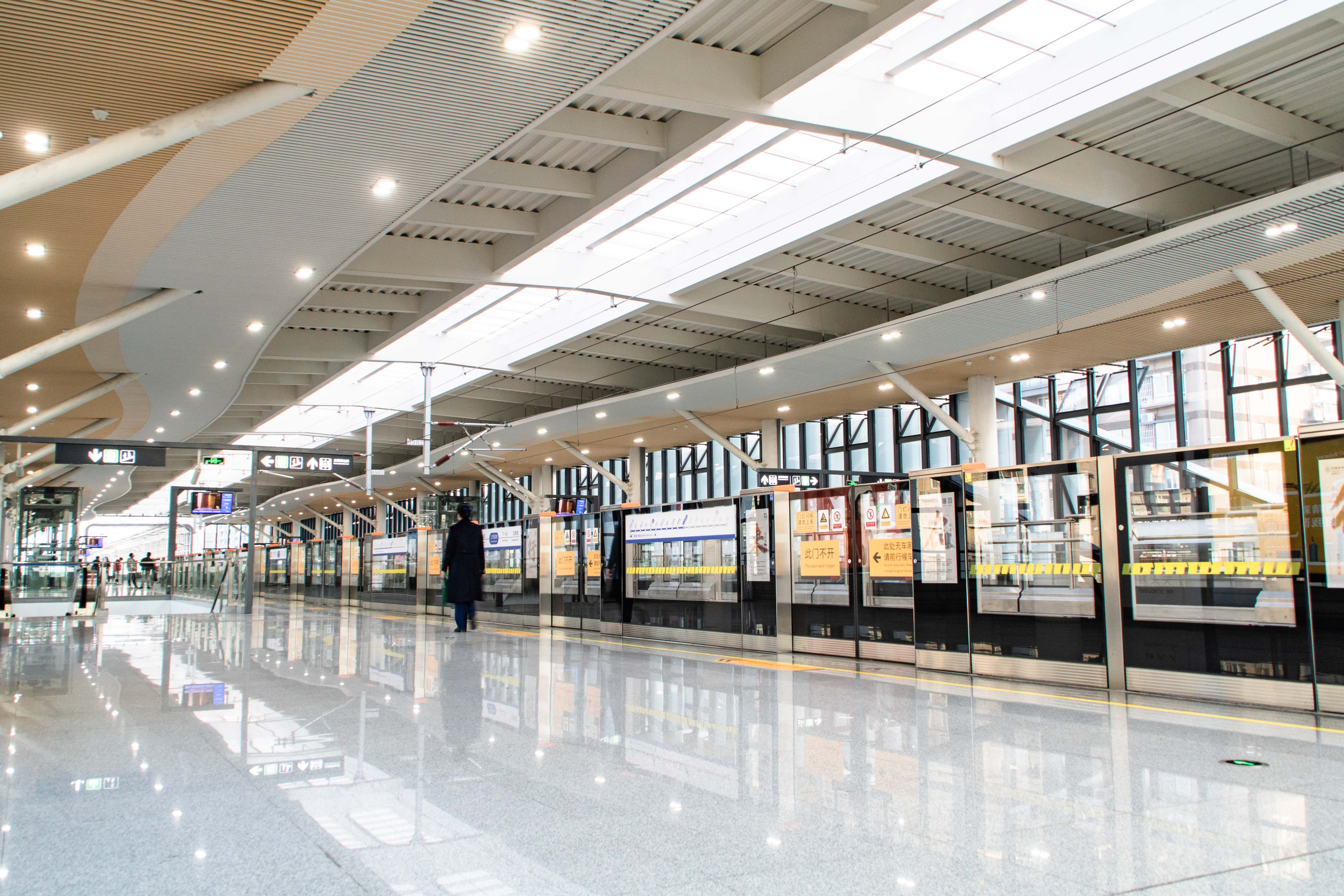 中文（中国大陆）: 三垟湿地站站台